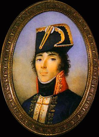 Portrait